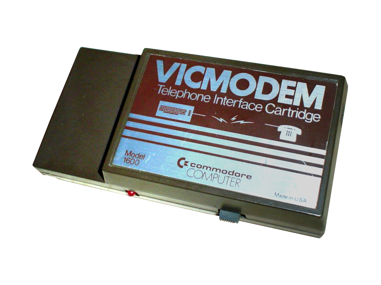 Commodore 64/128 VIC Modem Model 1600